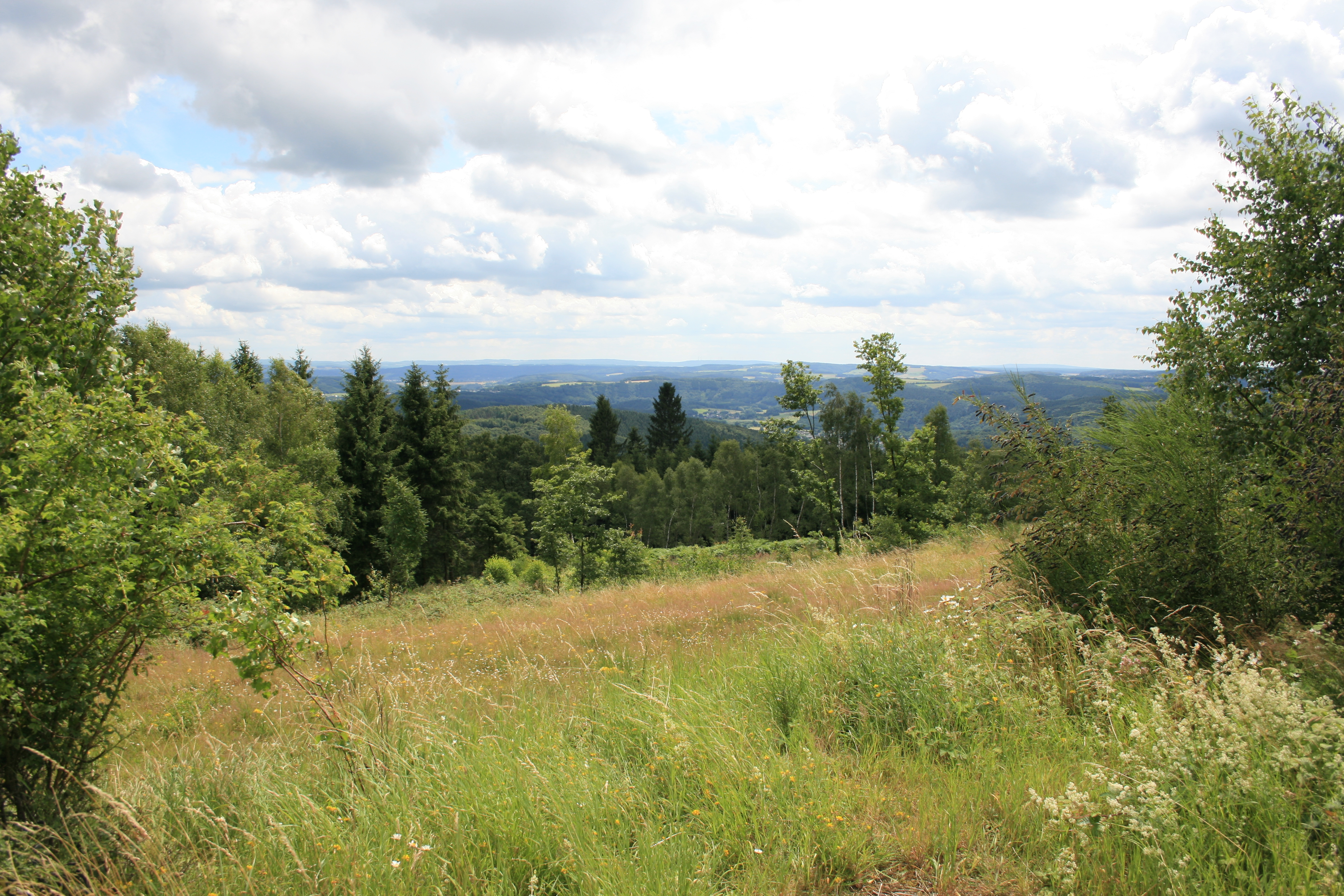 Blick vom Hohen Wäldchen in südliche Richtung